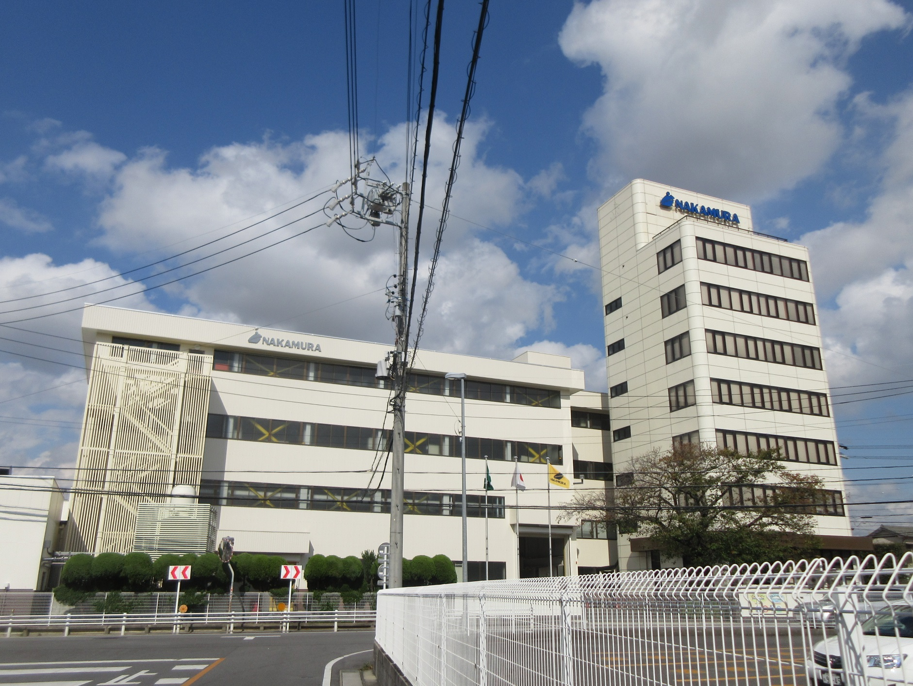 中村科学工業株式会社（岡崎市北野町）